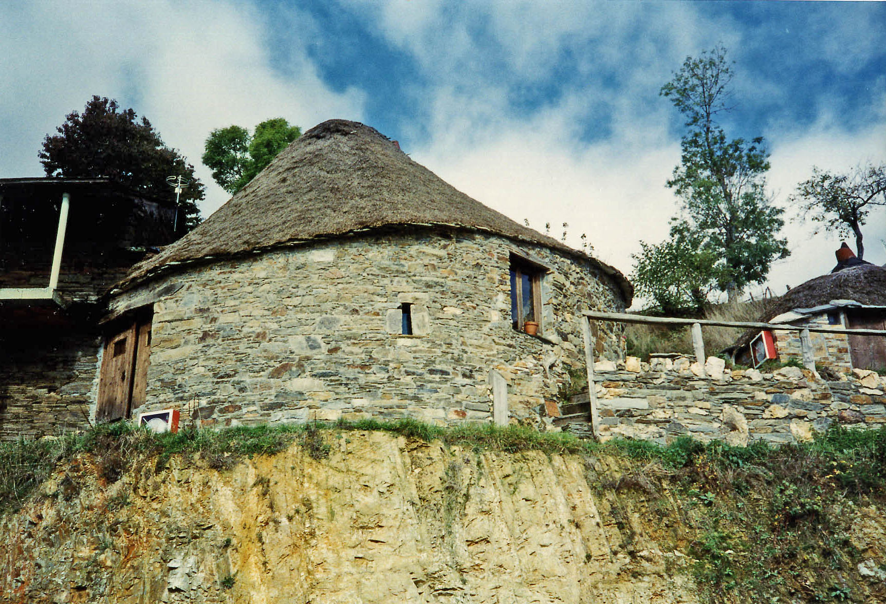 Palloza en la localidad de Cantejeira, municipio de Balboa en León, España. (Fotografía en papel).